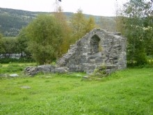 Mo kirkeruin: Mo church ruins picture